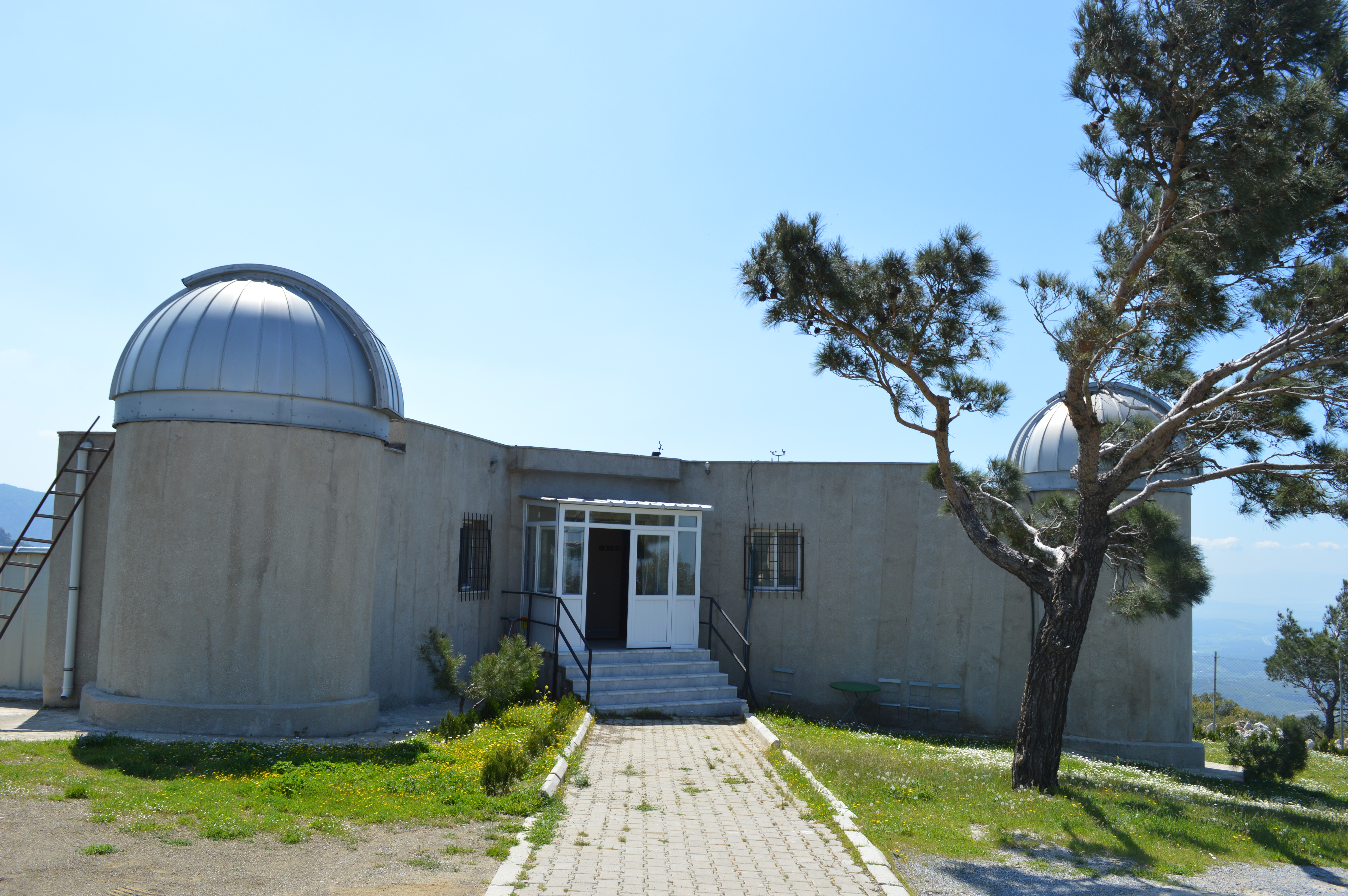 Ege Üniversitesi Gözlemevi T40 ve T35 Teleskop Kubbeleri